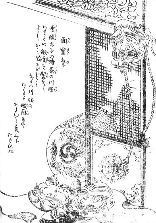 Menreiki (面霊気) from the Gazu Hyakki Tsurezure Bukuro (百器徒然袋)